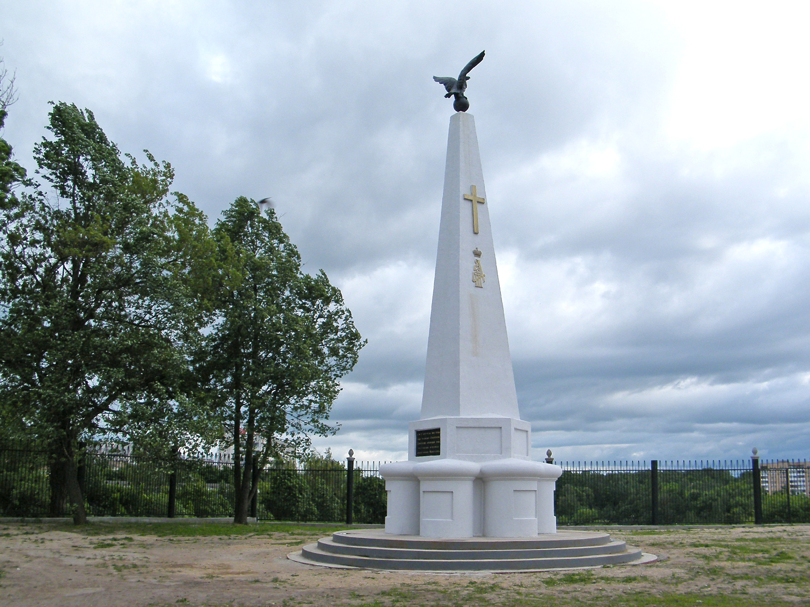 Памятник Софийскому пехотному полку